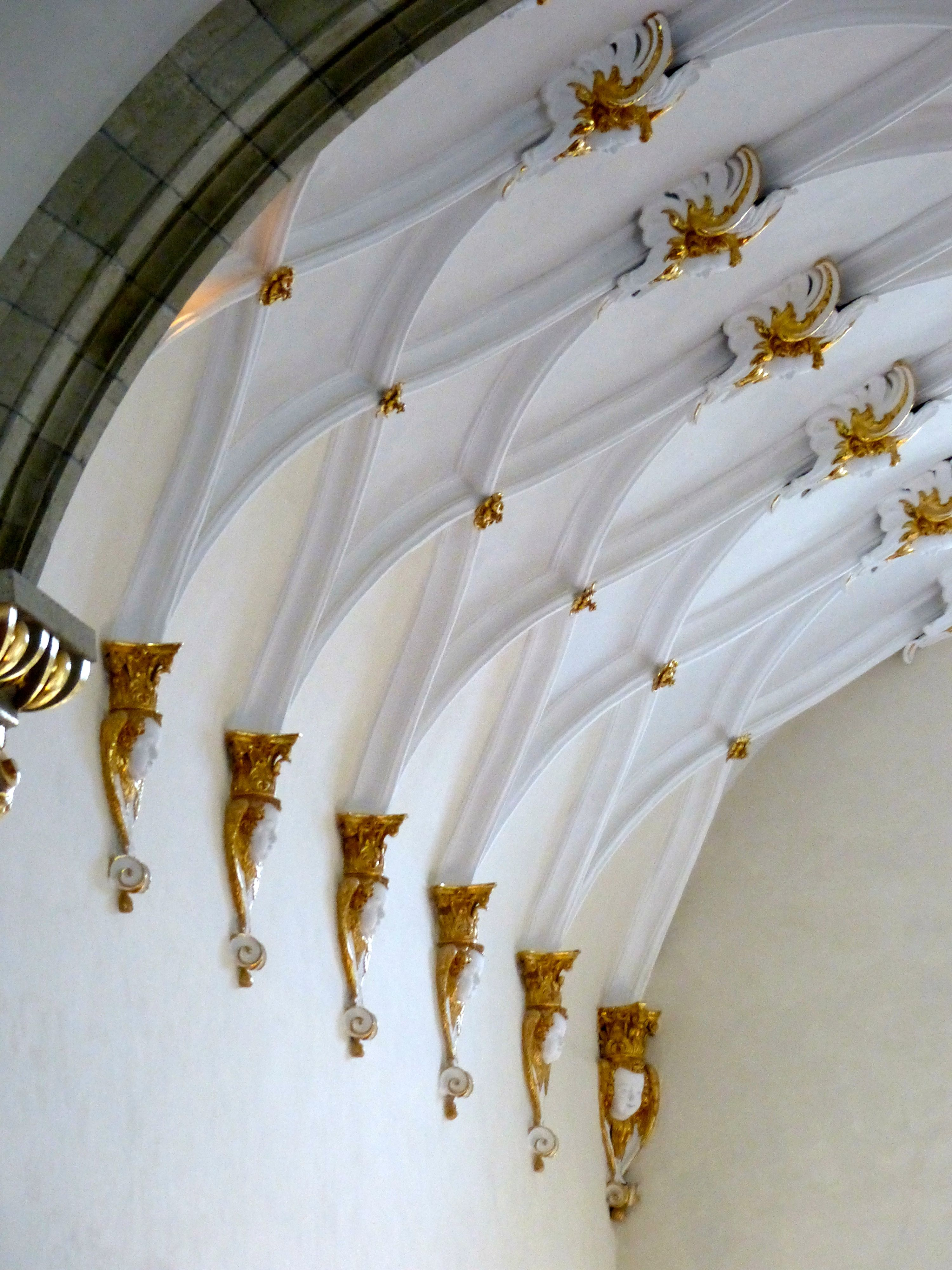 Regensburg: Dreieinigkeitskirche; Gurtbögen